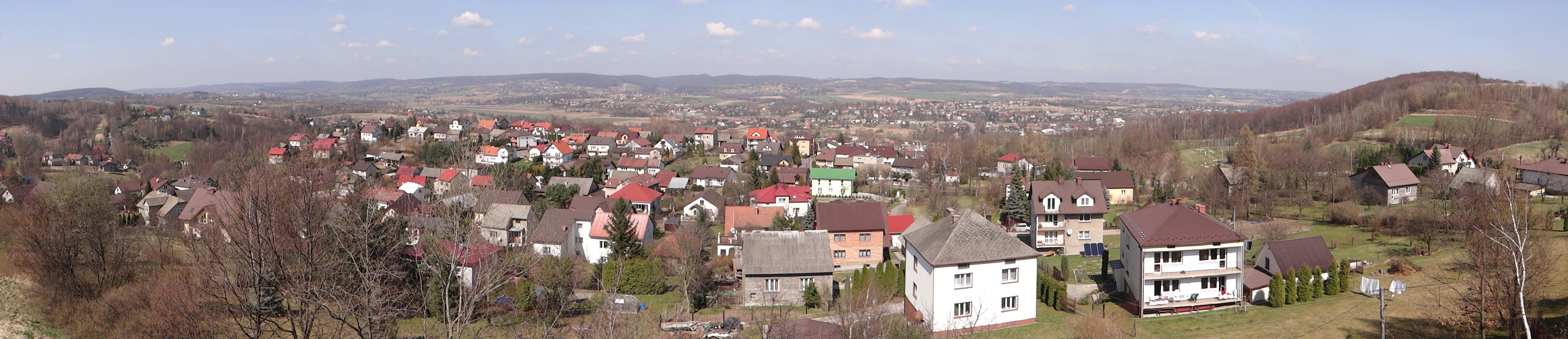 Widok ze Skały z krzyżem w Nielepicach